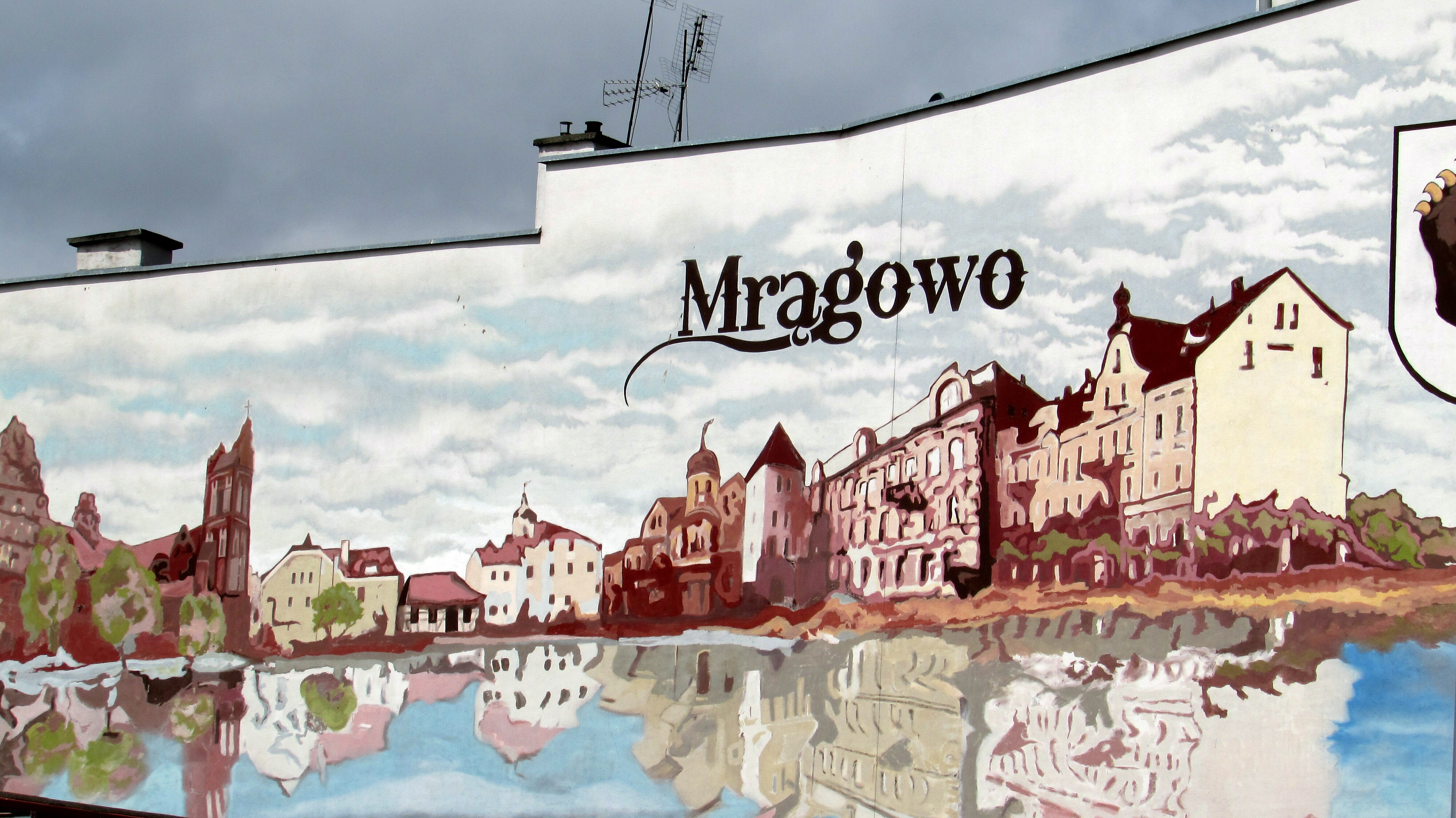 MragowoHausBemalung